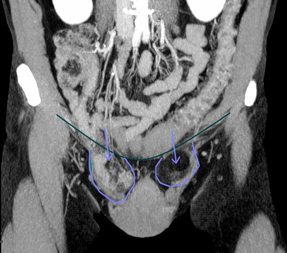 Leistenbruch beidseits, rechts (im Bild links) mit prolabierter Darmschlinge, links mit fettgeweblichem Prolaps. Volumenrekonstruktion einer CT-Bildserie, Aufsicht von vorne; Verlauf des Leistenbandes und prolabierte Gewebsanteile markiert.